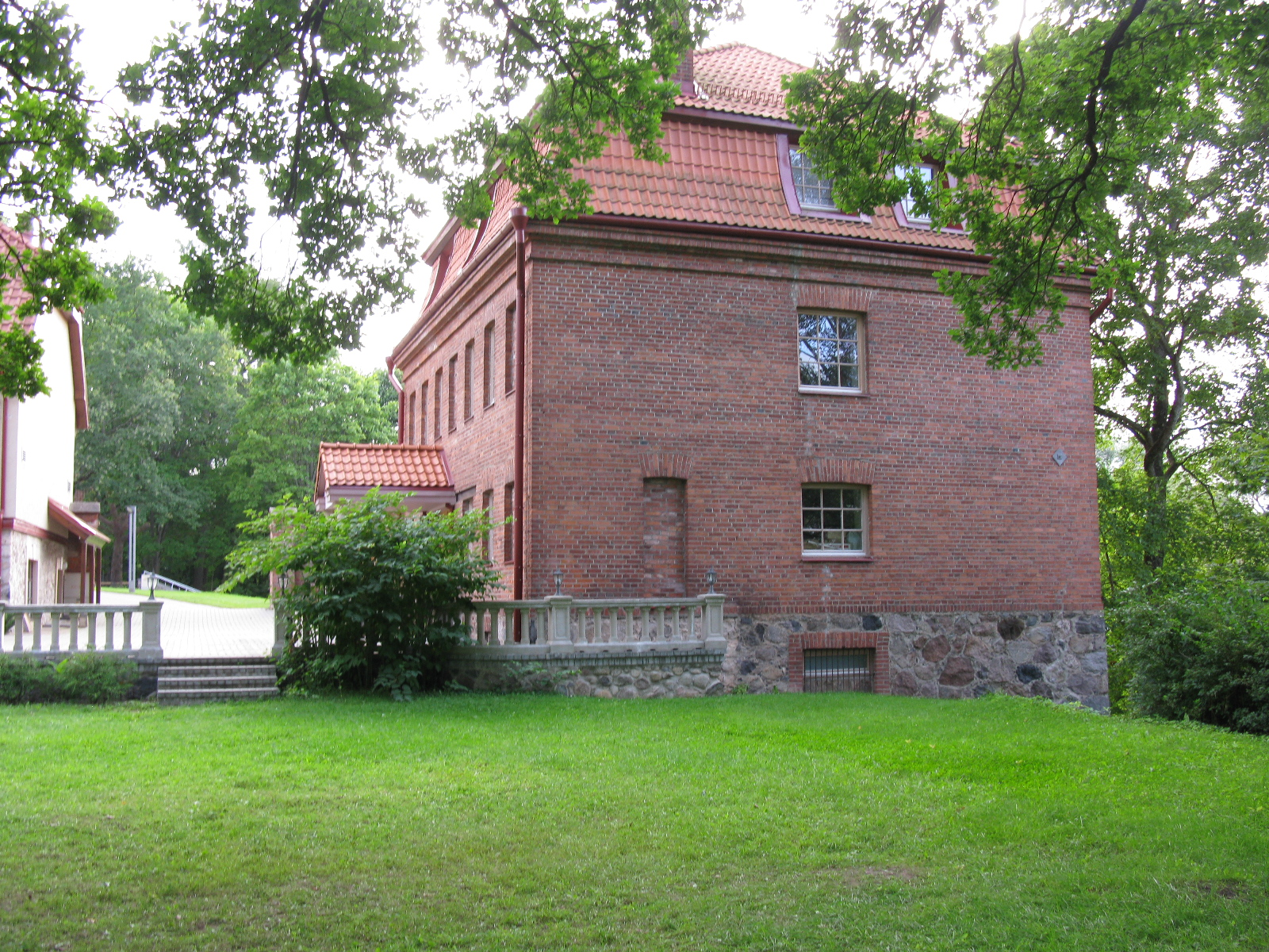 See vana hoone asetseb juba väljaspool pealinnuse müüre - põhjapoolse bastioni loodeserval.